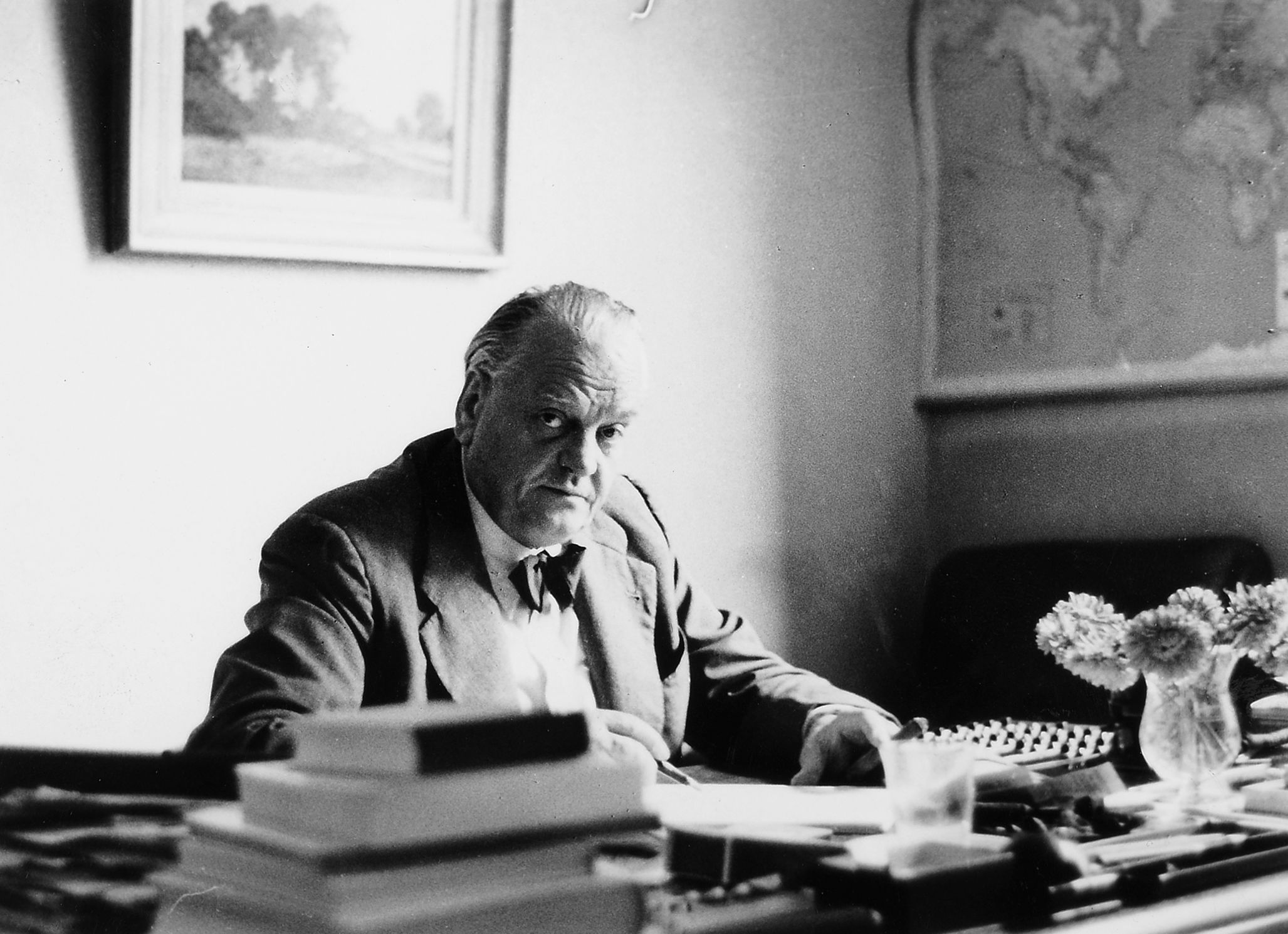 Gottlieb Duttweiler, Porträt am Pult